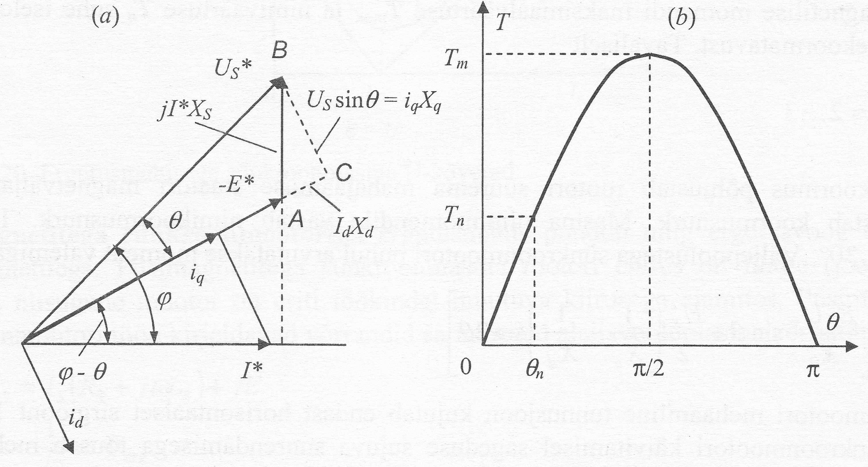 Sünkroonmootori lihtsustatud vektordiagramm